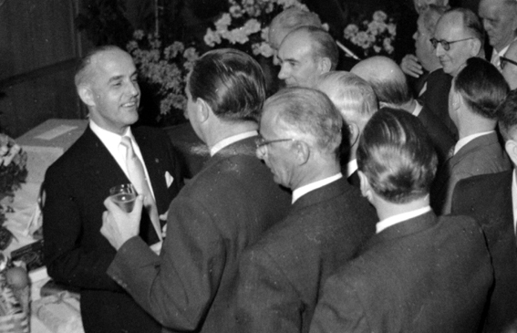 Direktor Max Neuhaus (links) bei dem Empfang von führenden Mitarbeitern der AEG und der Wirtschaft anlässlich von dessen 40jährigem AEG-Firmenjubiläum im Jahre 1956 in Berlin.